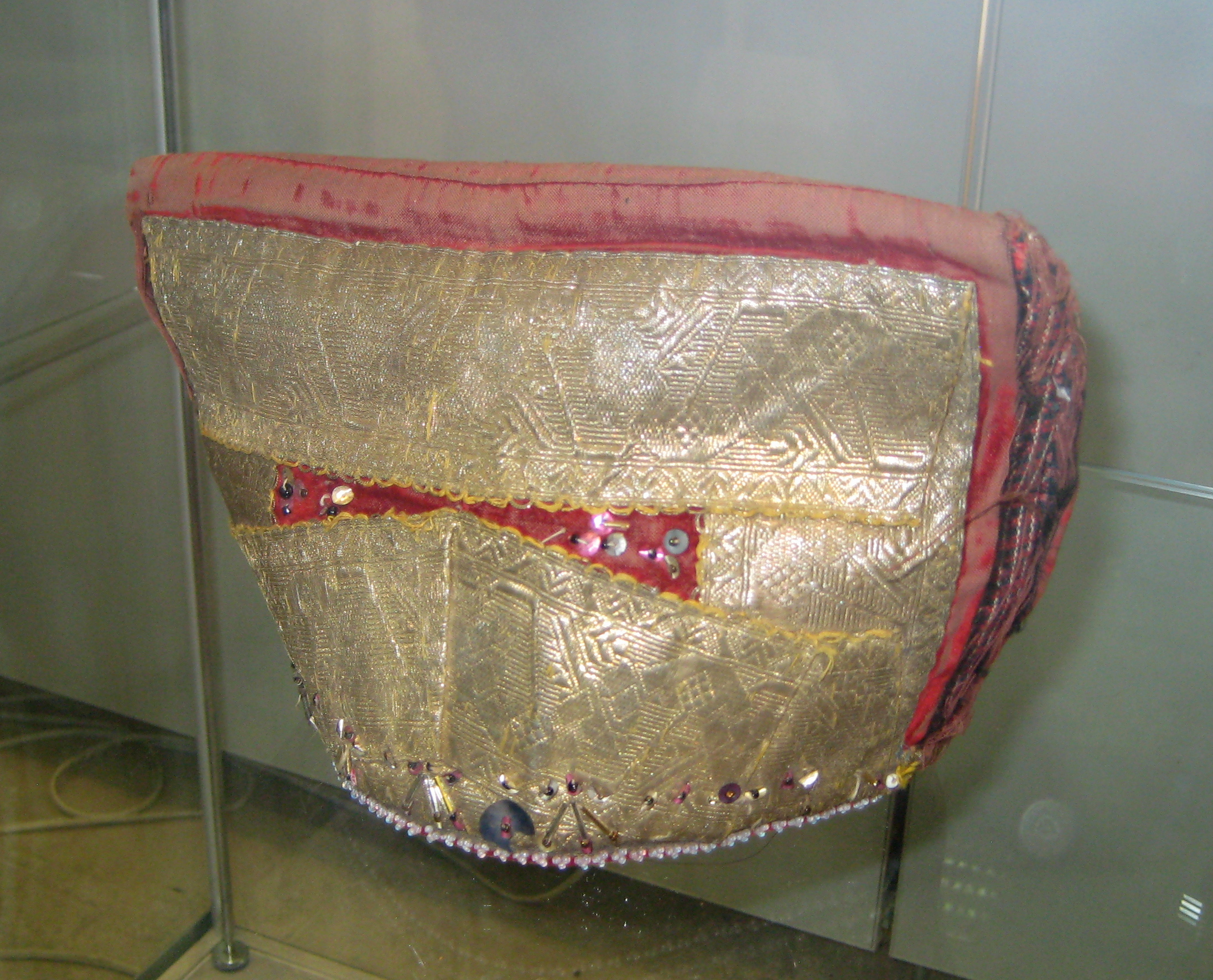 Кичка (Рязань) Рязанская область, 19 век. Кикой или кичкой называется старинный русский головной убор, известный ещё с 14 века, восходящий, по-видимому, к тотемному убору с двумя рогами. Рогатые кички встречались в народных костюмах центра и юга Руси ещё в 19 столетии, но большее распространение получили кички "лопатообразные" - подобные той, что находится в моей коллекции. С рогатыми кичками долго боролась православная церковь, считая их языческими символами, так что возник обычай покрывать рога шапочкой (её называли сорокой), в результате чего и создавалась такая своеобразная форма головного убора. Для того чтобы убор не терял своей формы, между верхними углами "лопаты" вставлена деревянная распорка.